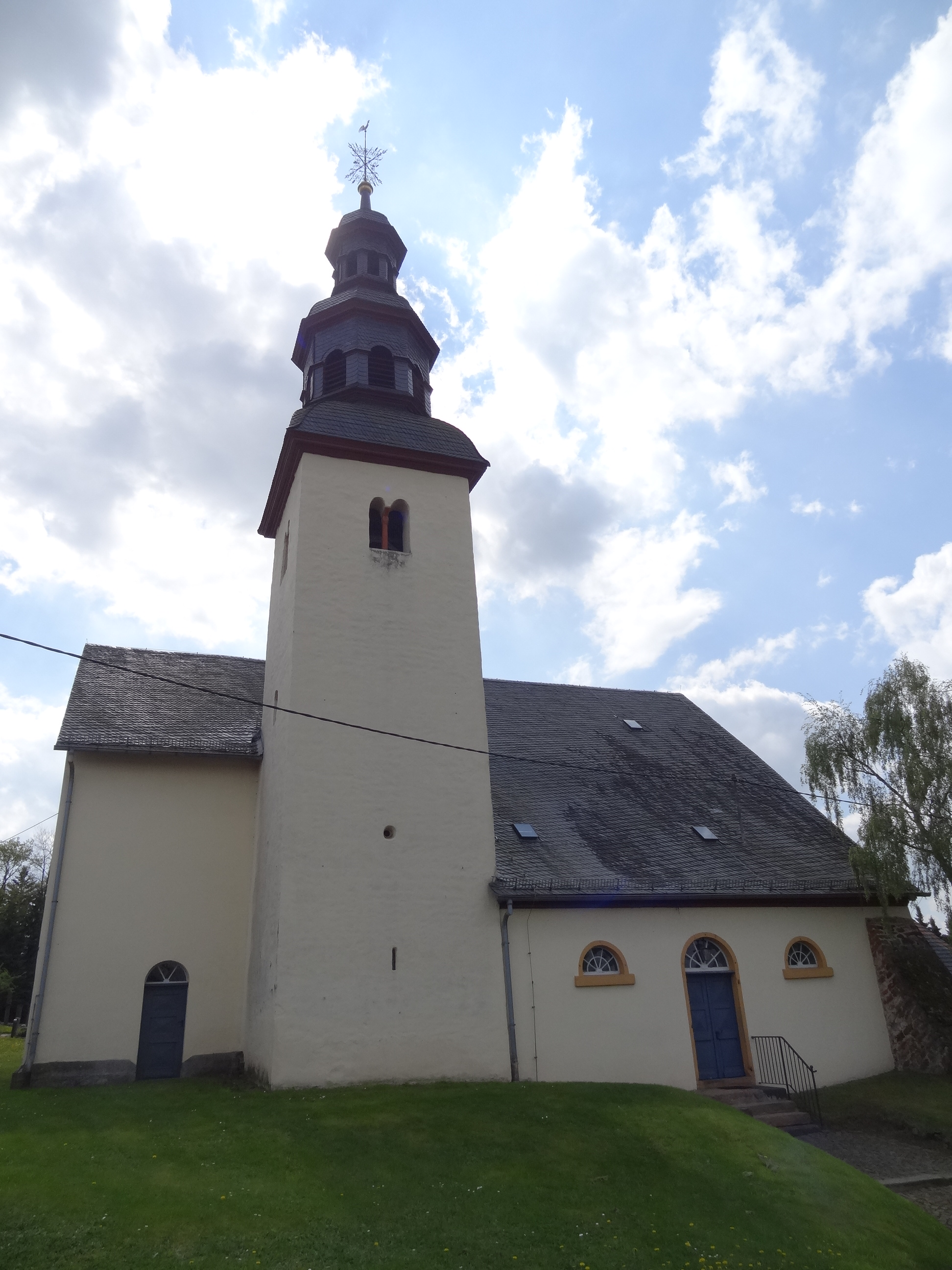 Evangelische Pfarrkirche Trais-Münzenberg